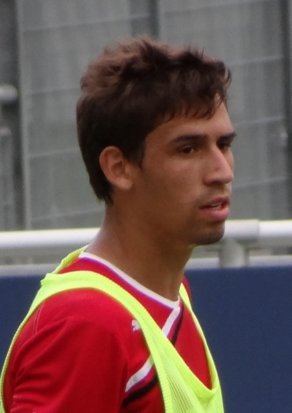 Rani Khedira beim Training der VfB-Profis. Aufgenommen von